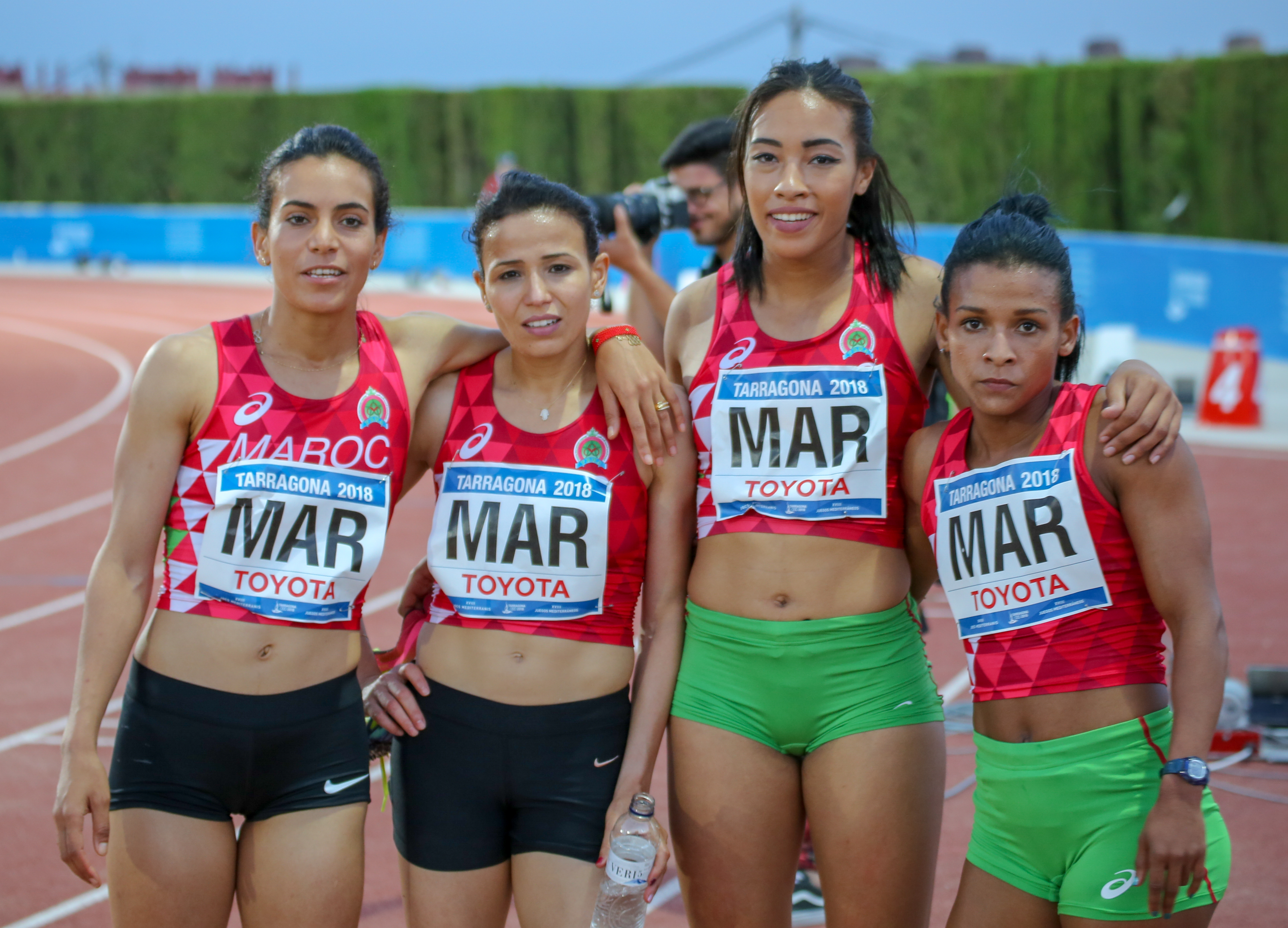 Marruecos en los relevos 4x400 en los Juegos del Mediterráneo 2018 (Assia Raziki, Malika Akkaoui, Khadija Ouardi, Rababe Arafi)